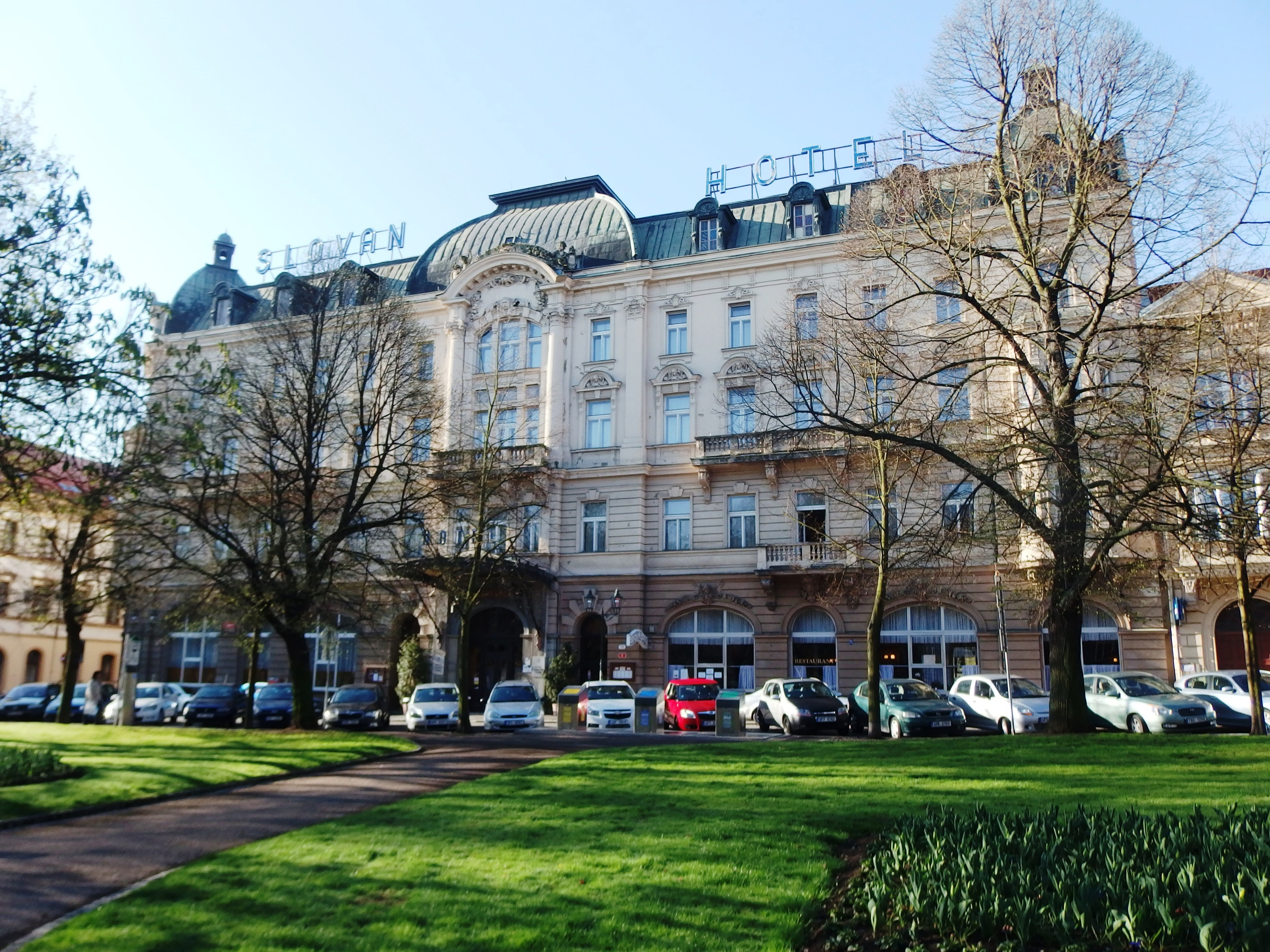 Hotel Slovan, Smetanovy sady 75/1, 301 00 Plzeň.